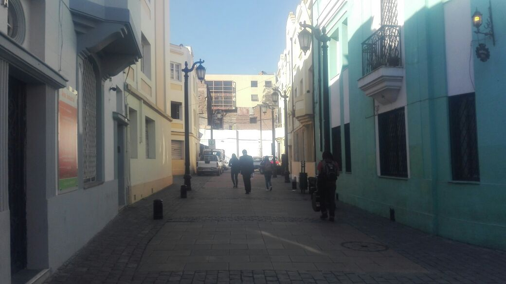 Pasaje República, 2016.